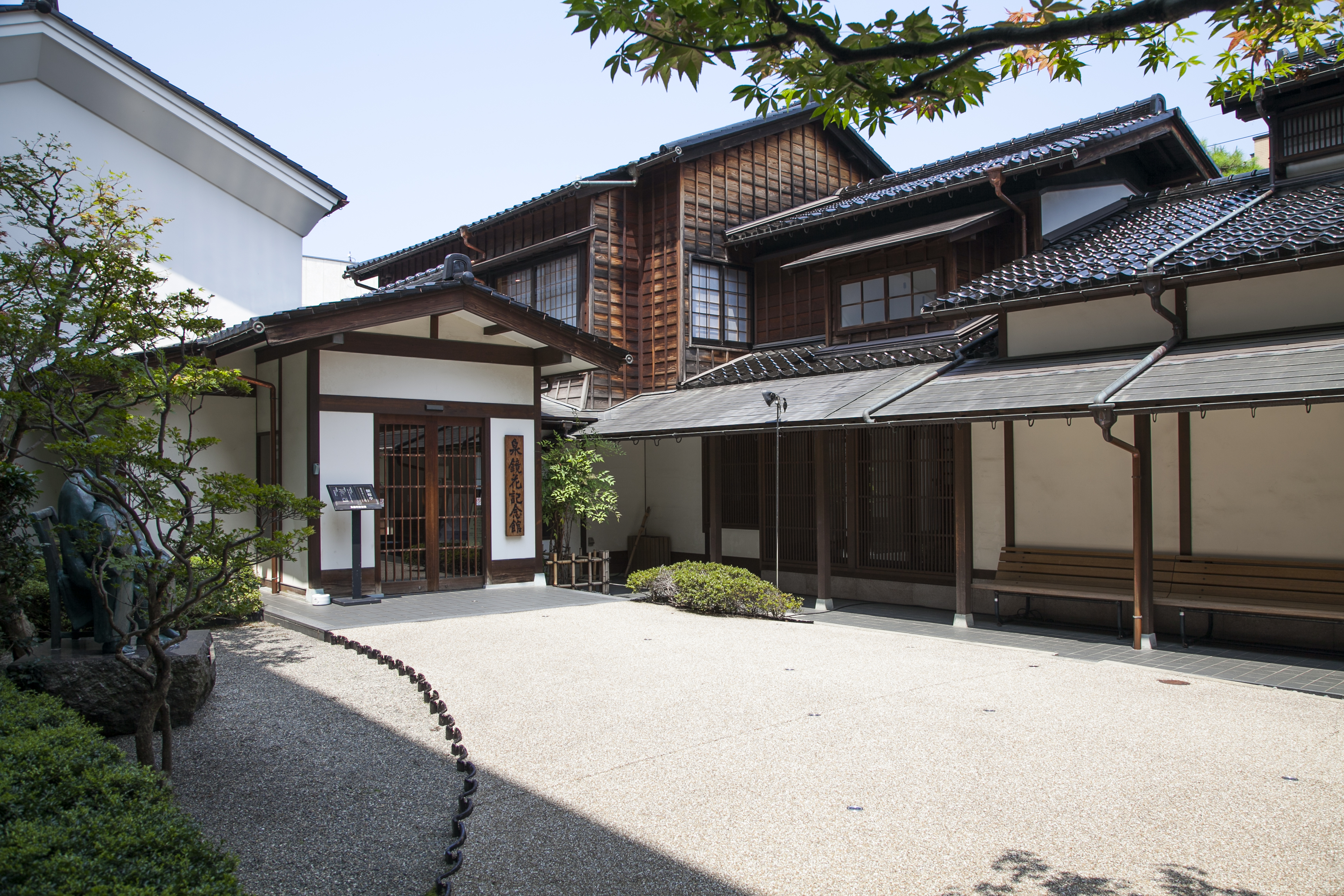 泉鏡花記念館